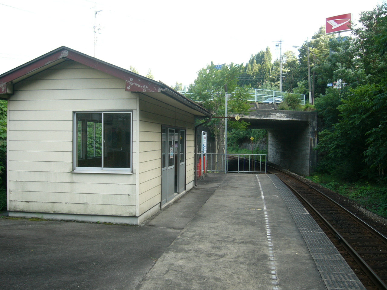 Kamioka-ohashi Station